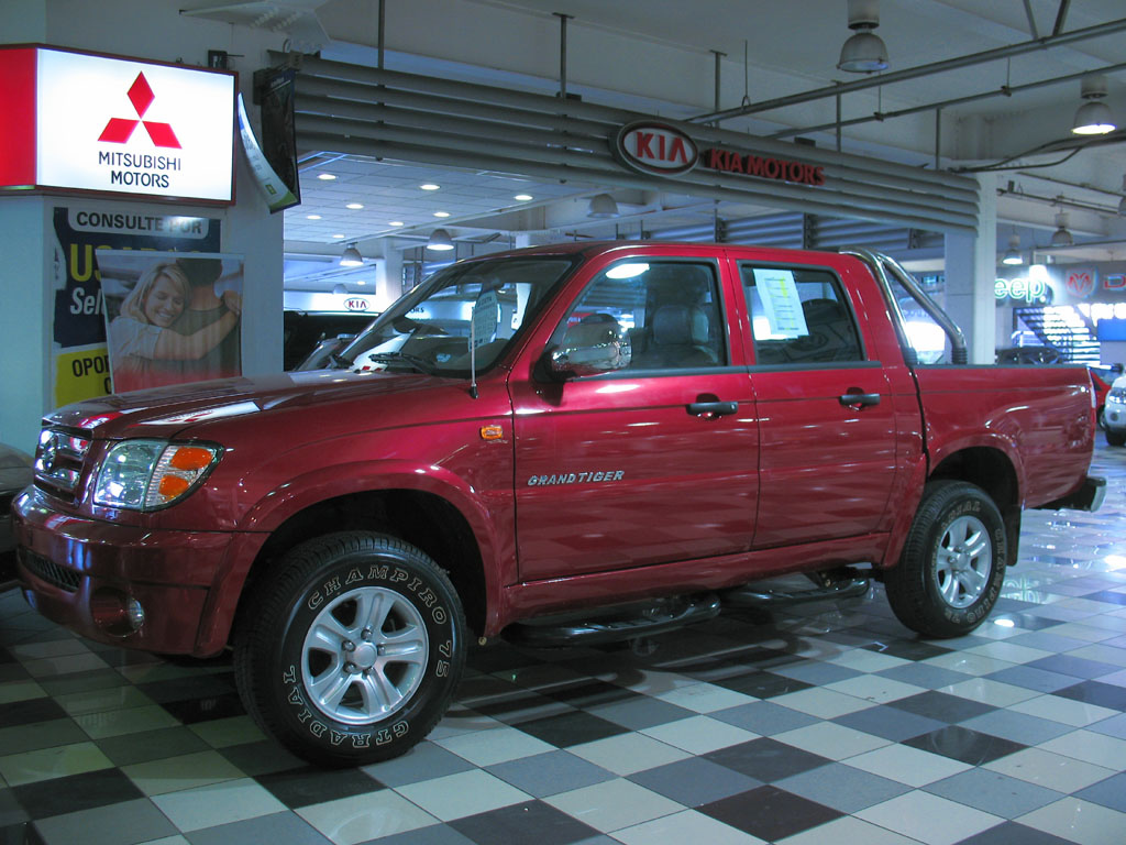 ZX Auto Grandtiger 2010